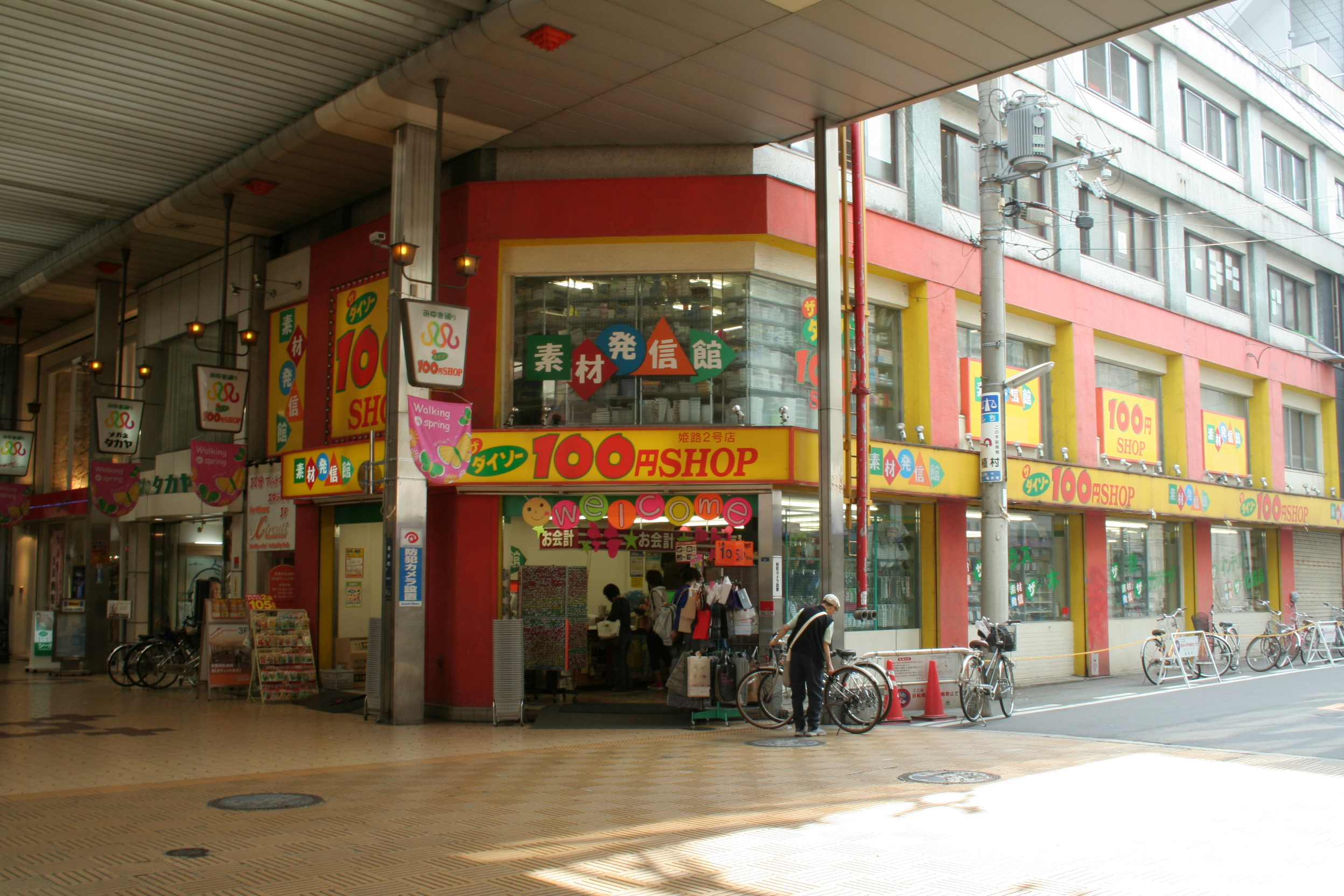 姫路市内で撮影した写真。 100円ショップのチェーン店ダイソーの姫路2号店。